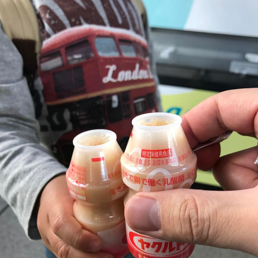 男2人の旅、もうすぐゴールなのでカンパイした。なおこの後バスの停車ボタンを押す押さないで大騒ぎだったのでぬかよろこびだったのは言うまでもない